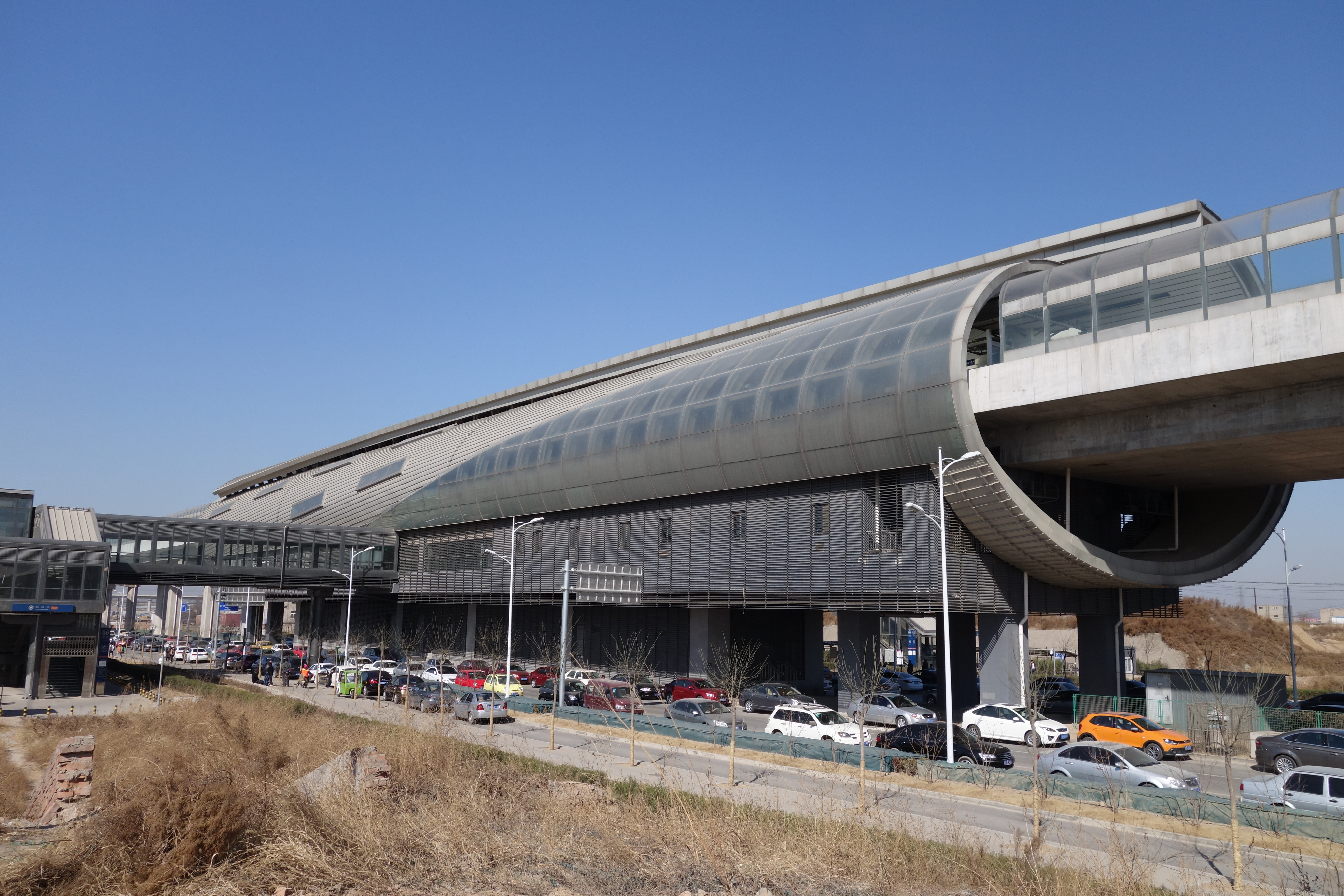 北京地铁房山线稻田站